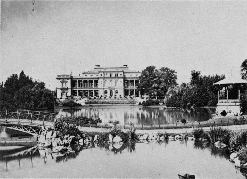 Blick von Osten auf das Zoo-Gesellschaftshaus Frankfurt, 1878